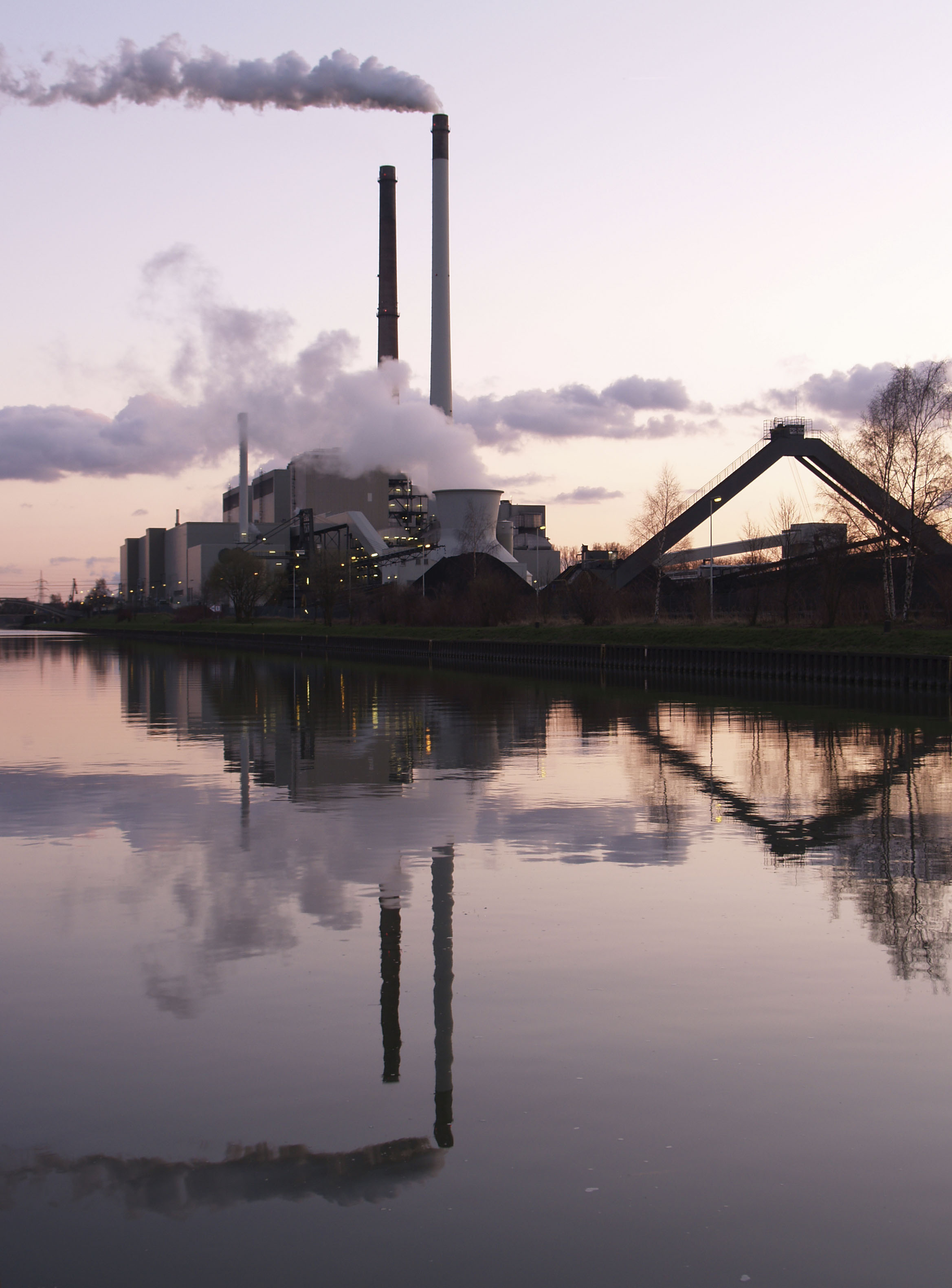 Coal power plant in Datteln (Germany) at the Dortmund-Ems-Kanal.